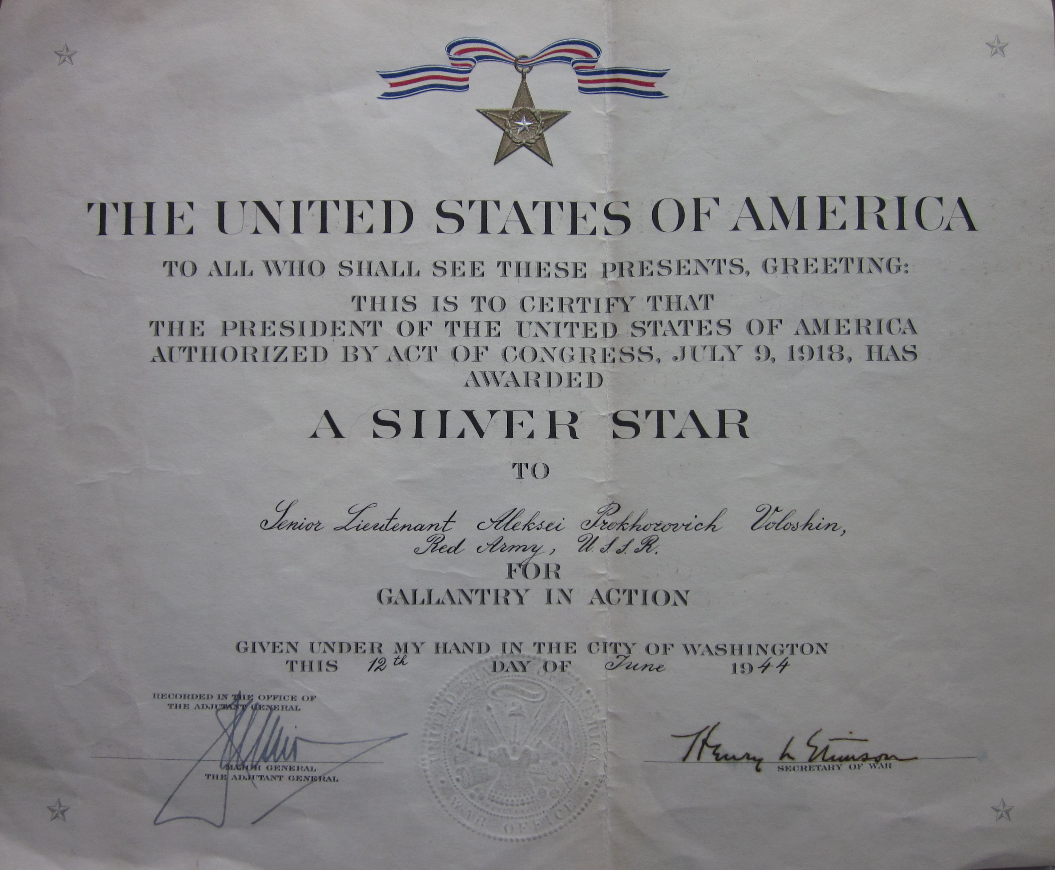 Документ подтверждающий награждение Алексея Прохоровича Волошина медалью Серебряная звезда (США)